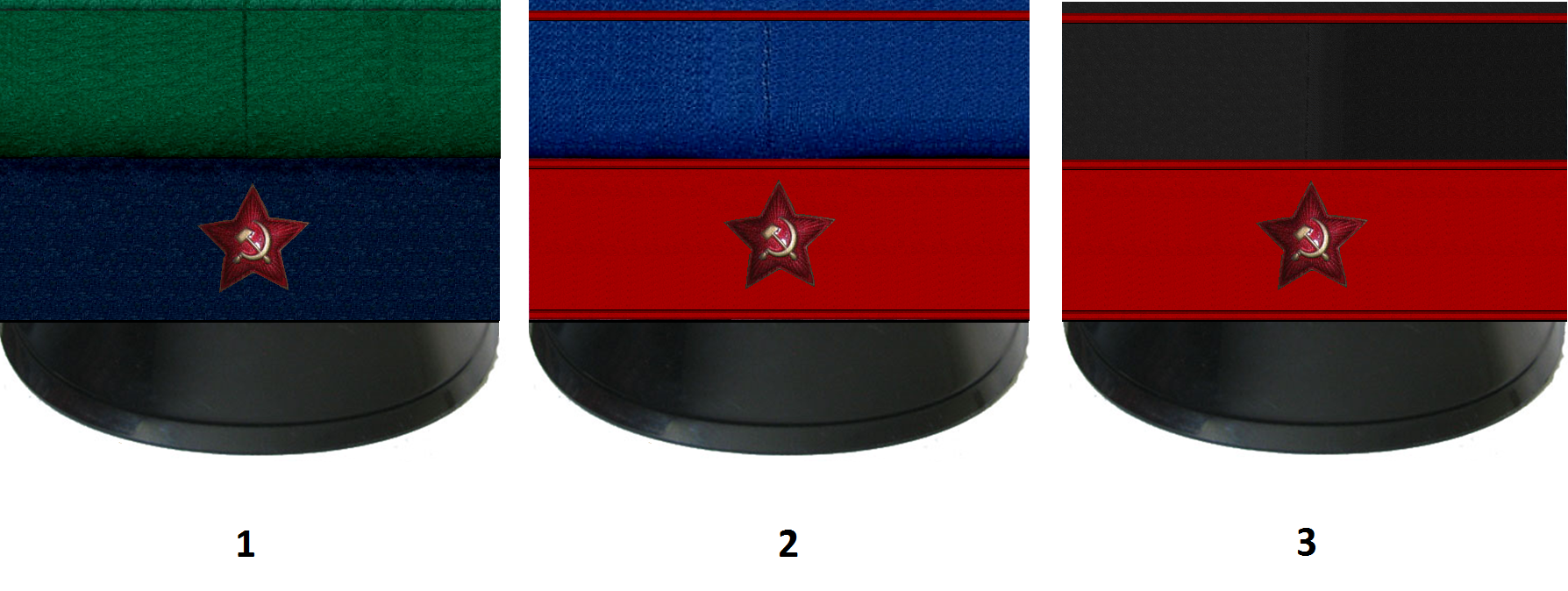 Фуражки ГПУ22